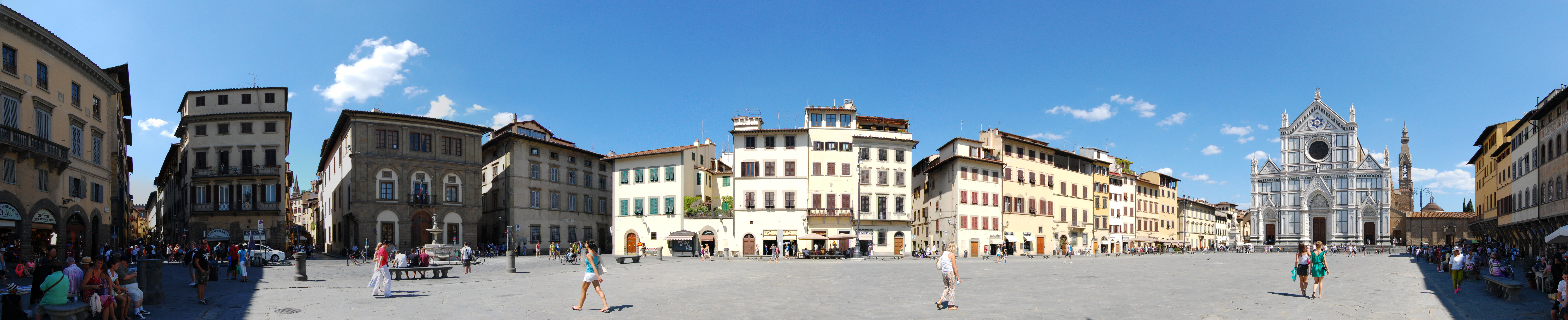 Santa Croce vista piazza